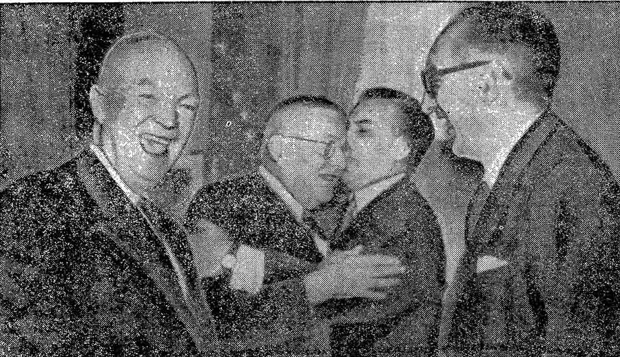 Casa Blanca: Los presidentes Eisenhower y Frondizi ríen mientras el embajador argentino en EEUU César Barros Hurtado le expresa algo al oído al Secretario de Estado John Foster Dulles.